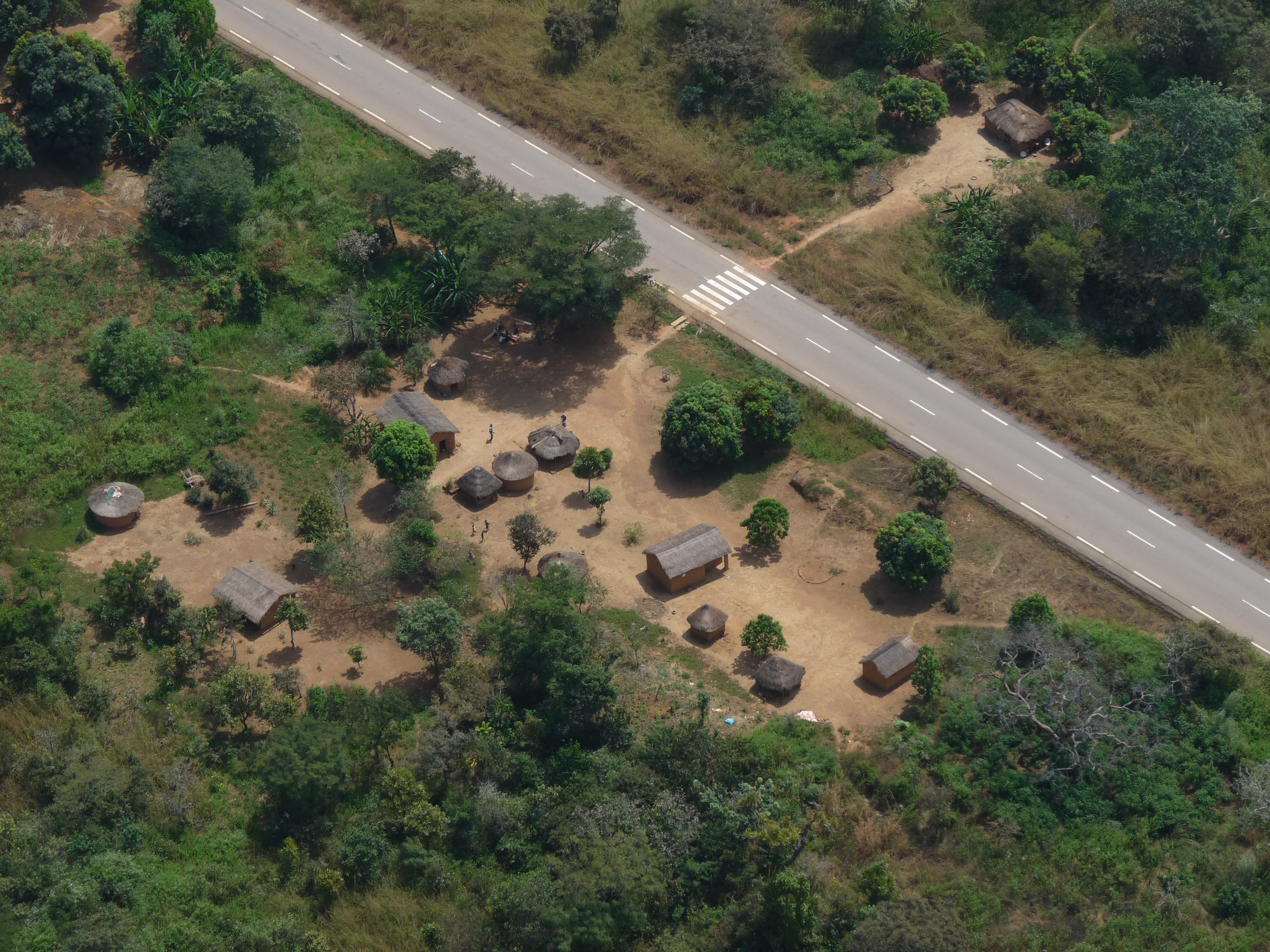 Village centrafricain sur la route Bouar-Cantonnier.